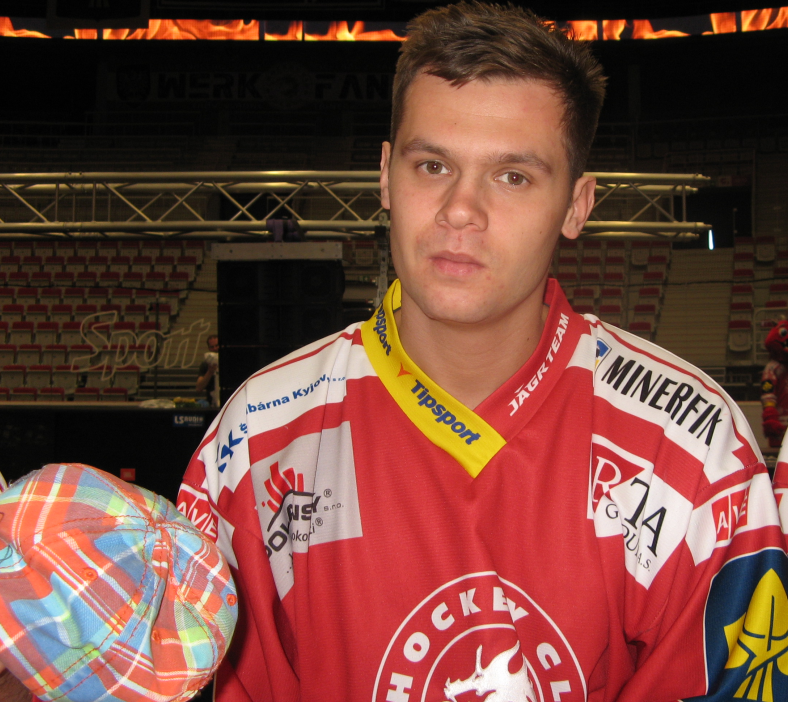 Po zakončení sezóny 2014/15 ve Werk Areně